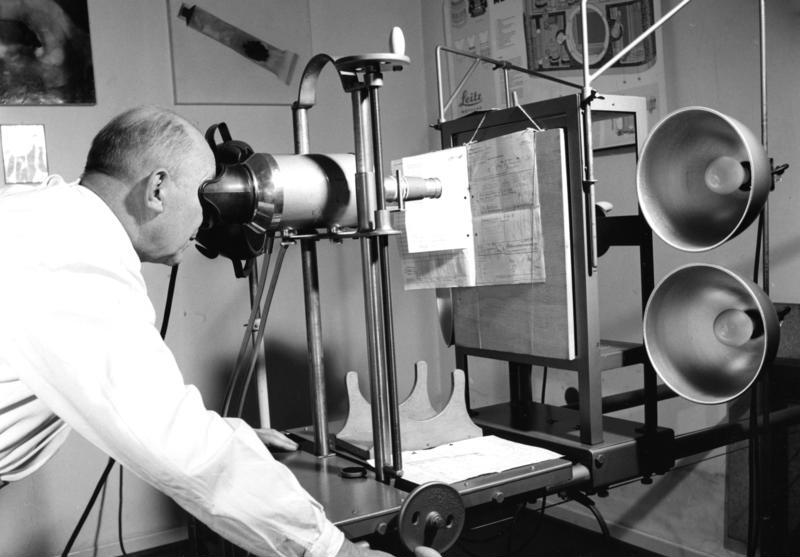 1961 Köln Zollkrimminalinstitut Untersuchung von Schriftstücken mit Infrarotstrahlen zur Erkennung von Fälschungen und Übermalungen